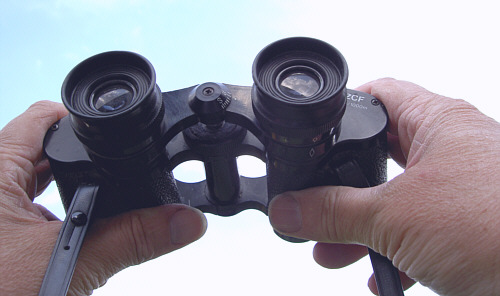 Kleines Fernglas Copyright Status: GNU Freie Dokumentationslizenz